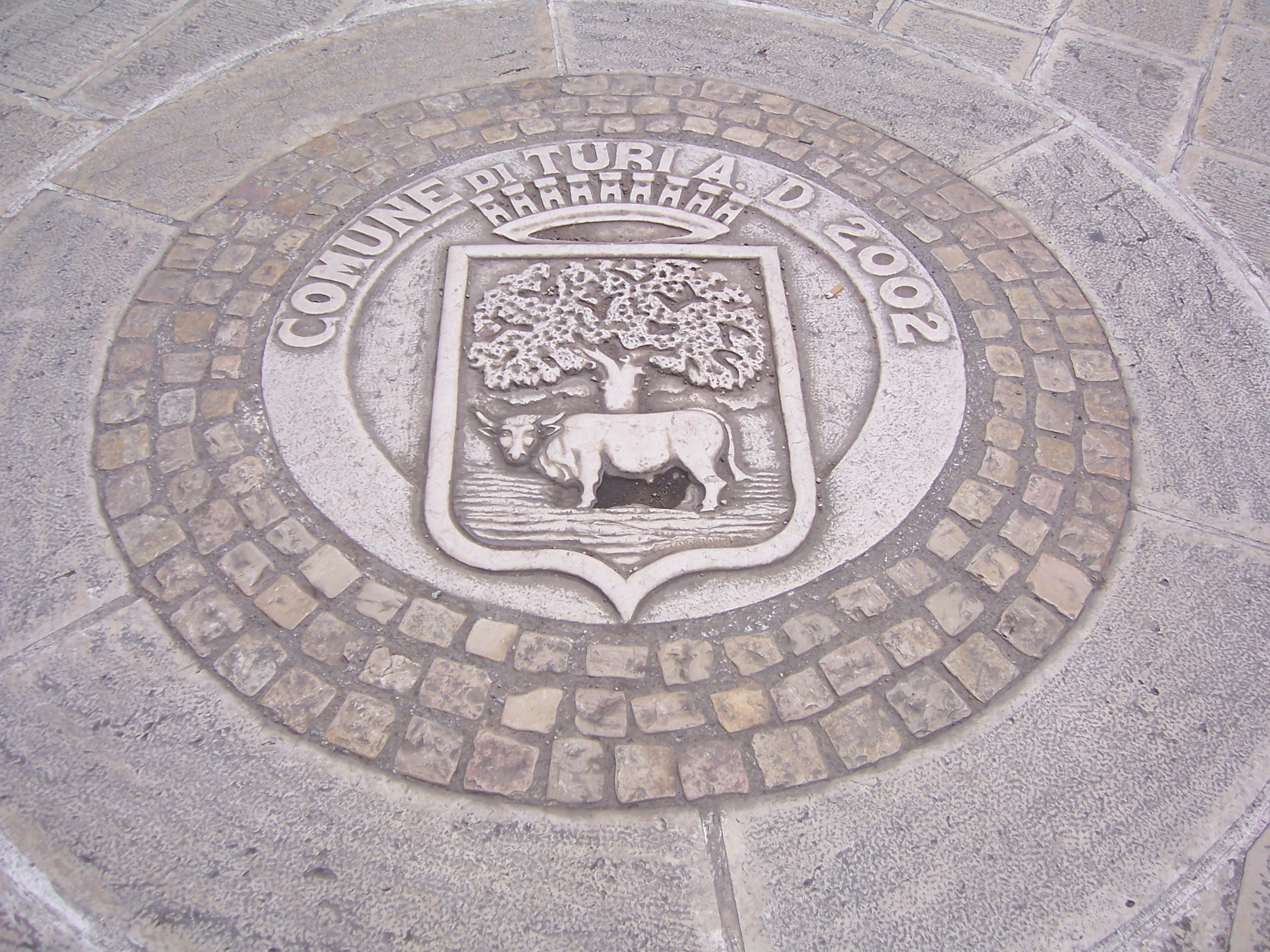 Stemma di Turi e stemmi delle famiglie. Chianca sita in Piazza Silvio Orlandi